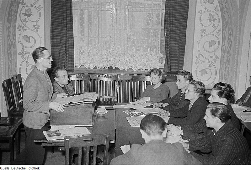 Original image description from the Deutsche Fotothek Volkskorrespondenten-Lehrgang im Ratskeller